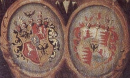 Allianzwappen Sporck-Swéerts, bestehend aus dem Grafenwappen Sporck und dem Freiherrenwappen Swéerts; begründet durch die Ehe des Franz Anton von Sporck mit Franziska Apollonia Freiin von Swéerts zu Reist, deren Tochter Anna Katharina mit Franz Karl Rudolf Freiherr von Swéerts und Reist das neue Geschlecht Swéerts-Sporck begründete, vgl. Sporck und Category:Coats of arms of Swéerts-Reist family